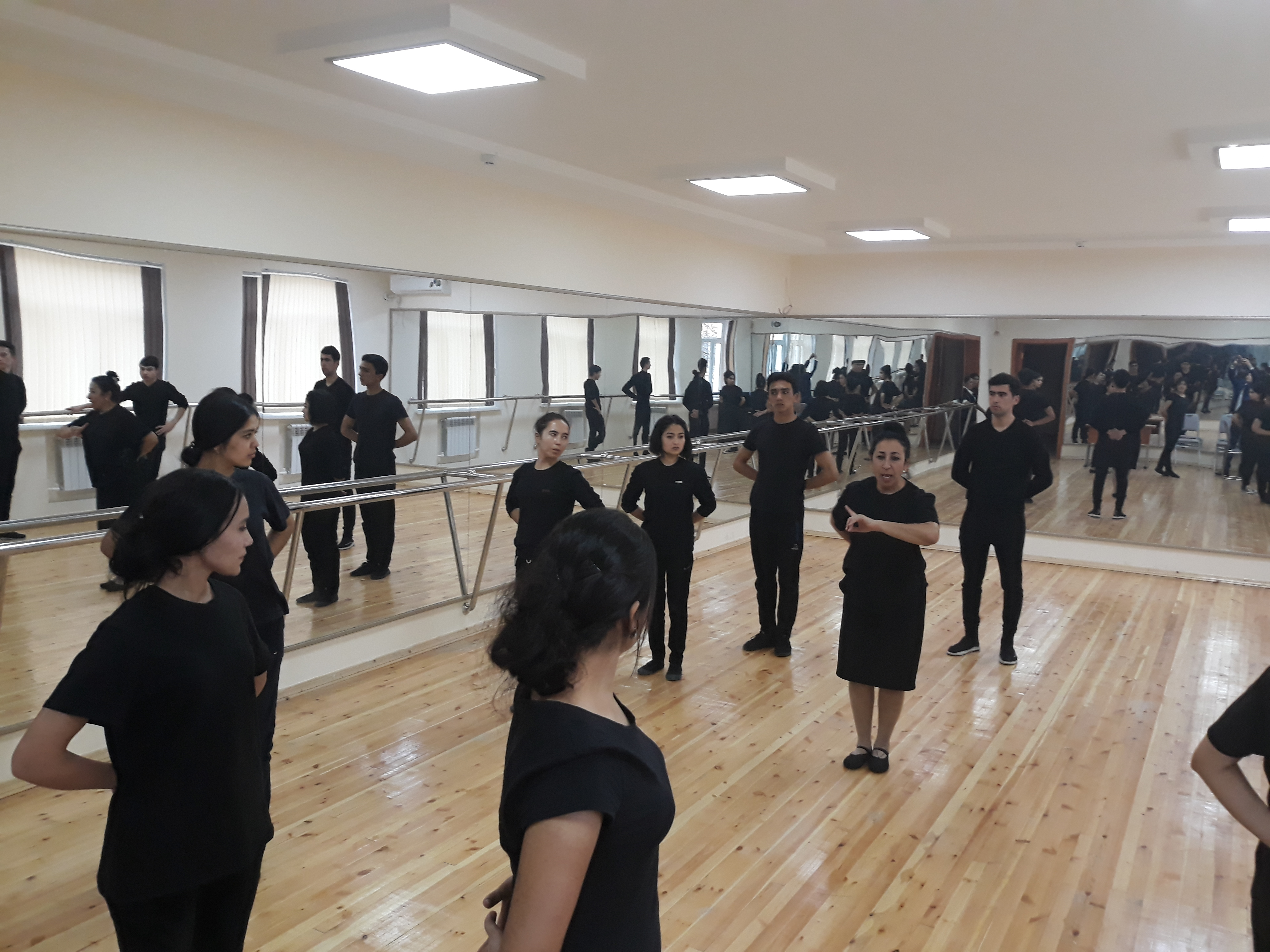 Oʻzbekcha/ўзбекча: Plastika mashg'ulotlari